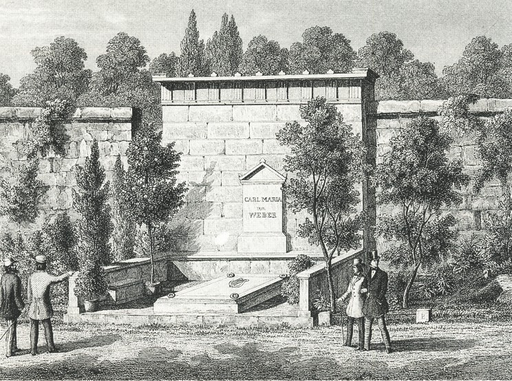 Gustav Täubert: Carl Maria von Webers Grabmal auf dem Alten Katholischen Friedhof in Dresden.